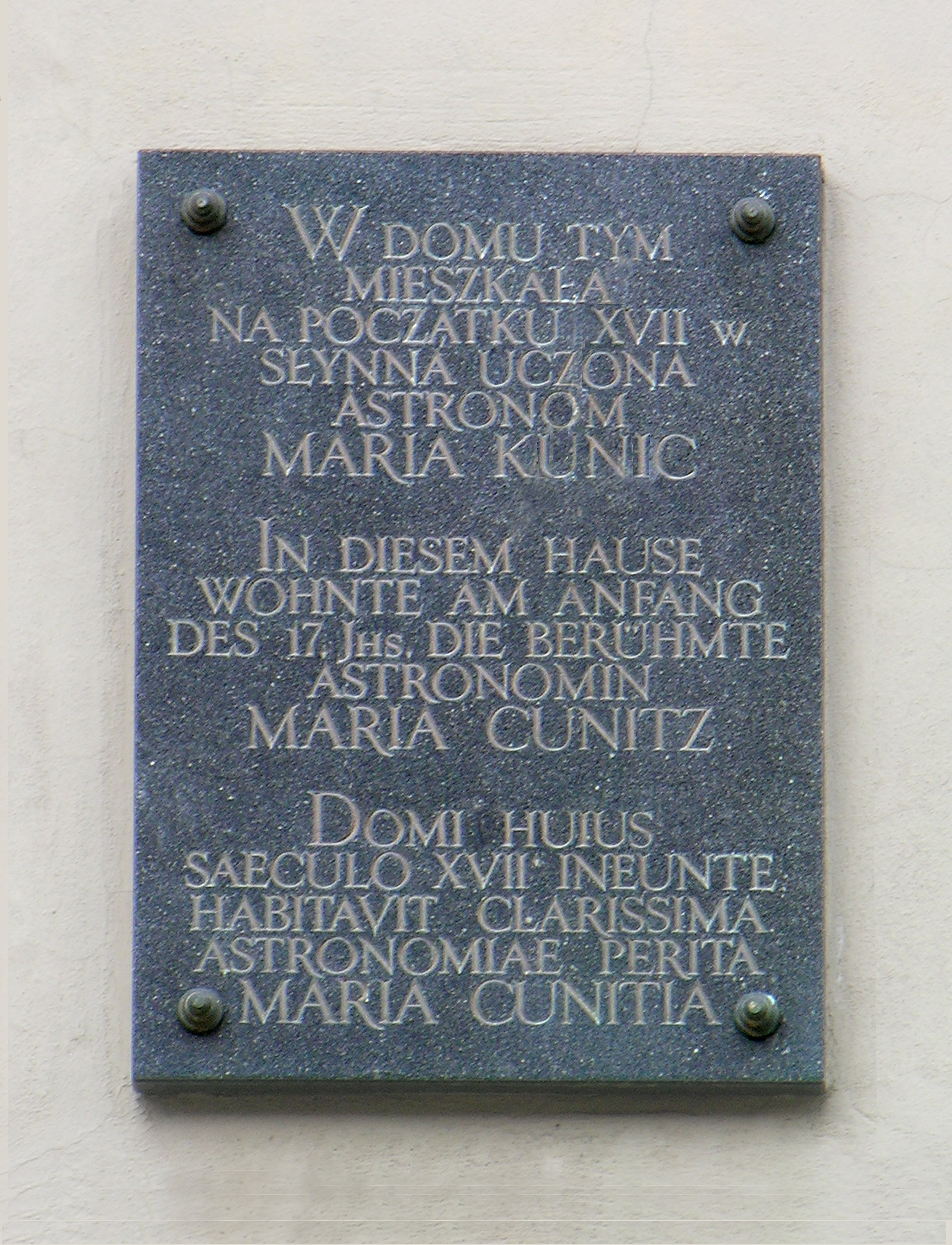 Tablica ku czci Marii Kunic w Świdnicy, Rynek 8.